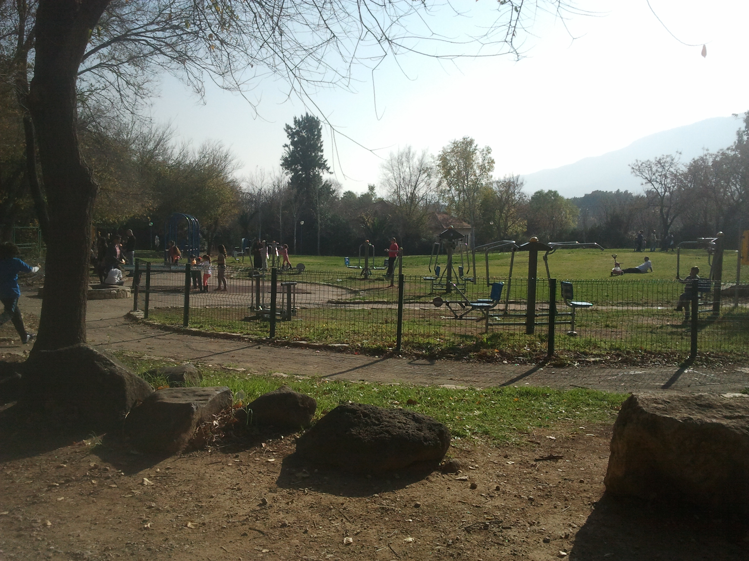 פארק הזהב הוא הפארק המרכזי העירוני בקרית שמונה. בתוכו זורם נחל עין זהב אזור נופש פעיל בםארק